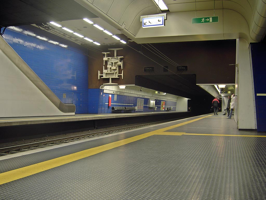 Juridicum, Haltestelle der Stadtbahn Bonn